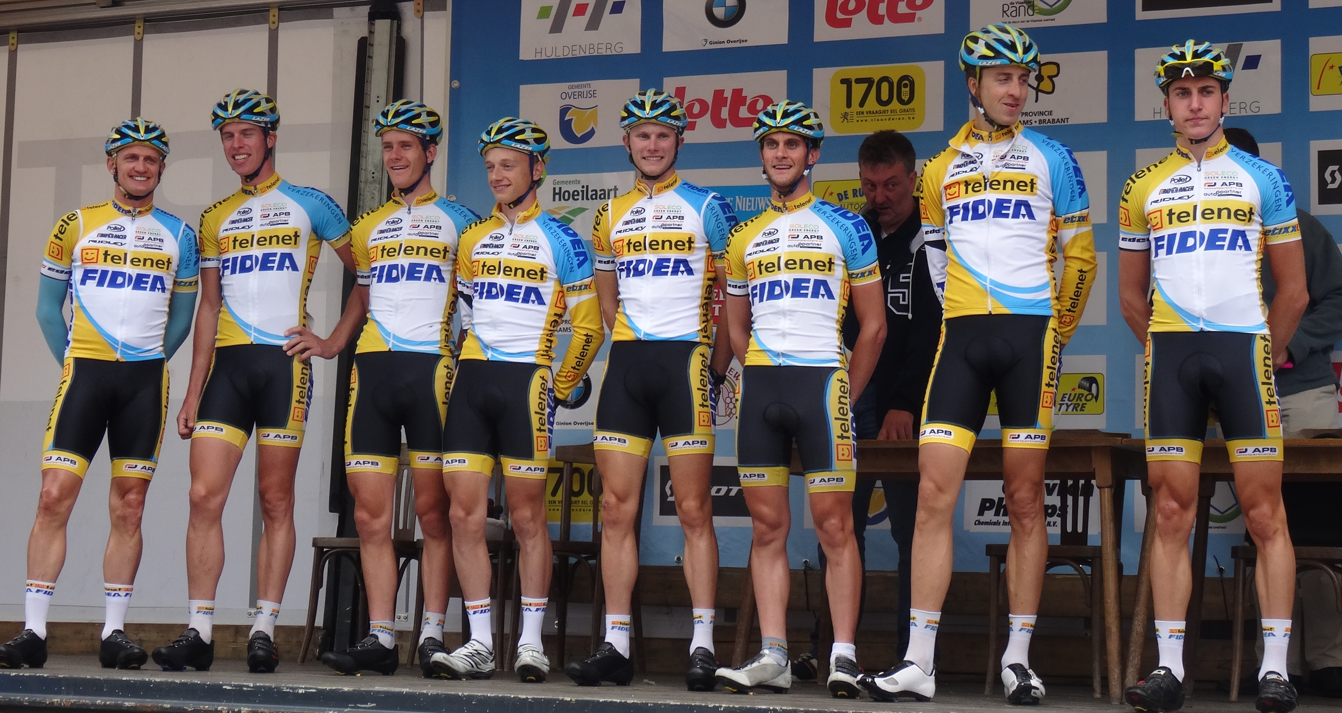 Reportage photographique réalisé le mercredi 27 août à l'occasion du départ de la Druivenkoers Overijse 2014 à Huldenberg, Belgique.